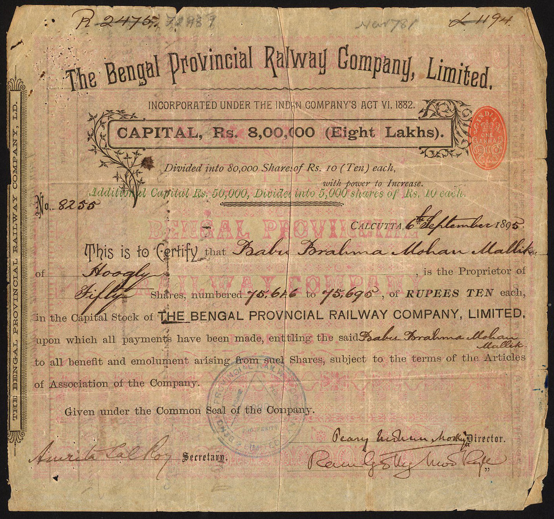 Bengal Provincial Railway Co. Ltd., certificate for 10 rupee shares, 189(5), black, pink underprint